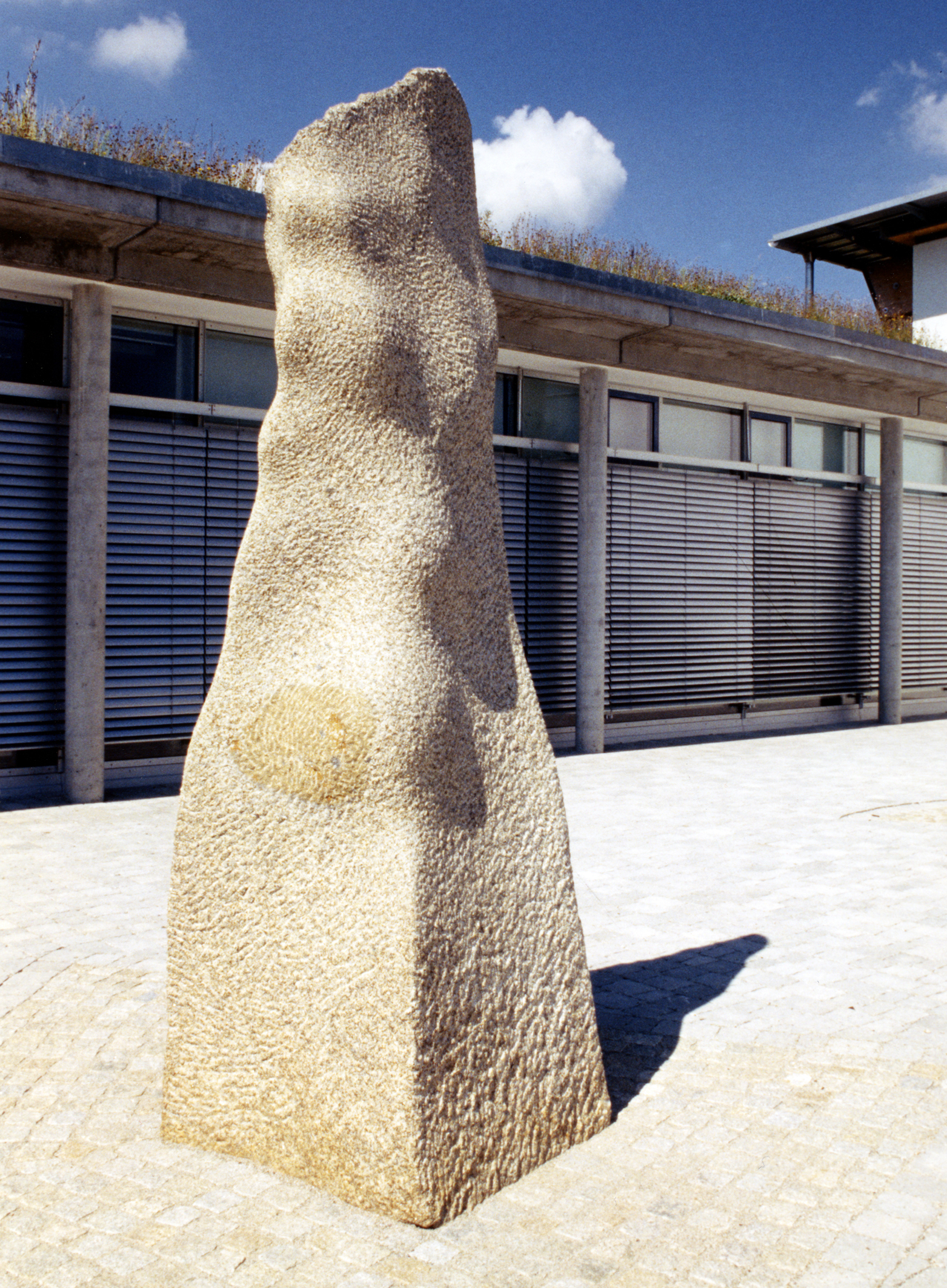 Granitskulptur